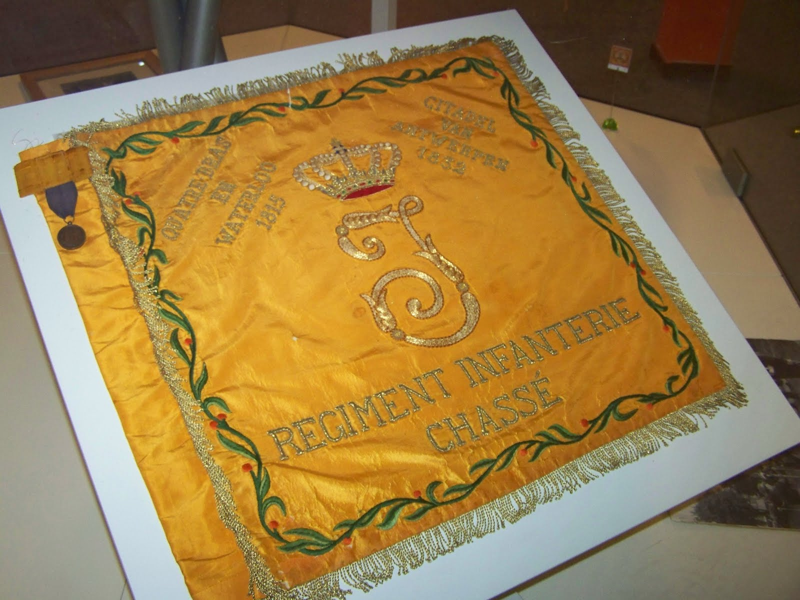 Museumpark Harskamp, Vaandel Regiment Infanterie Chassé